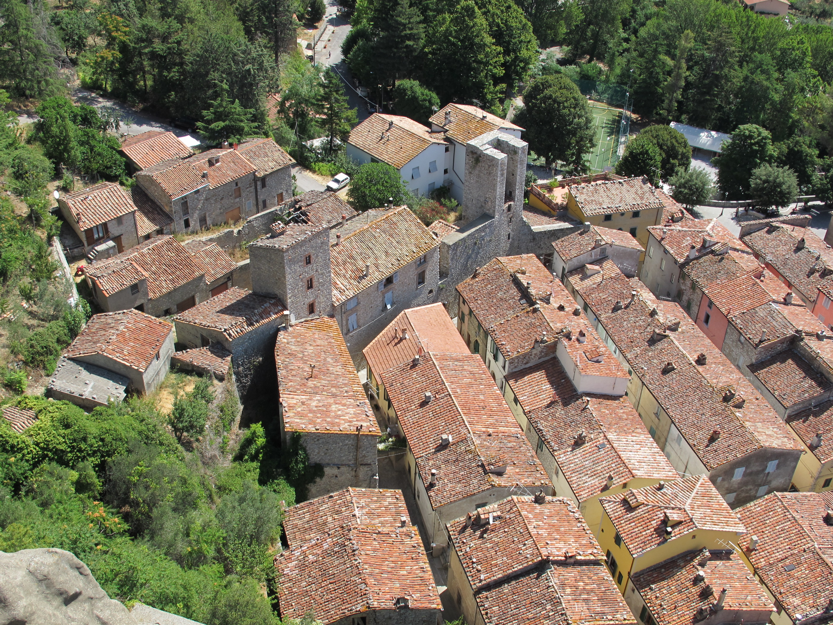 Roccalbegna, veduta